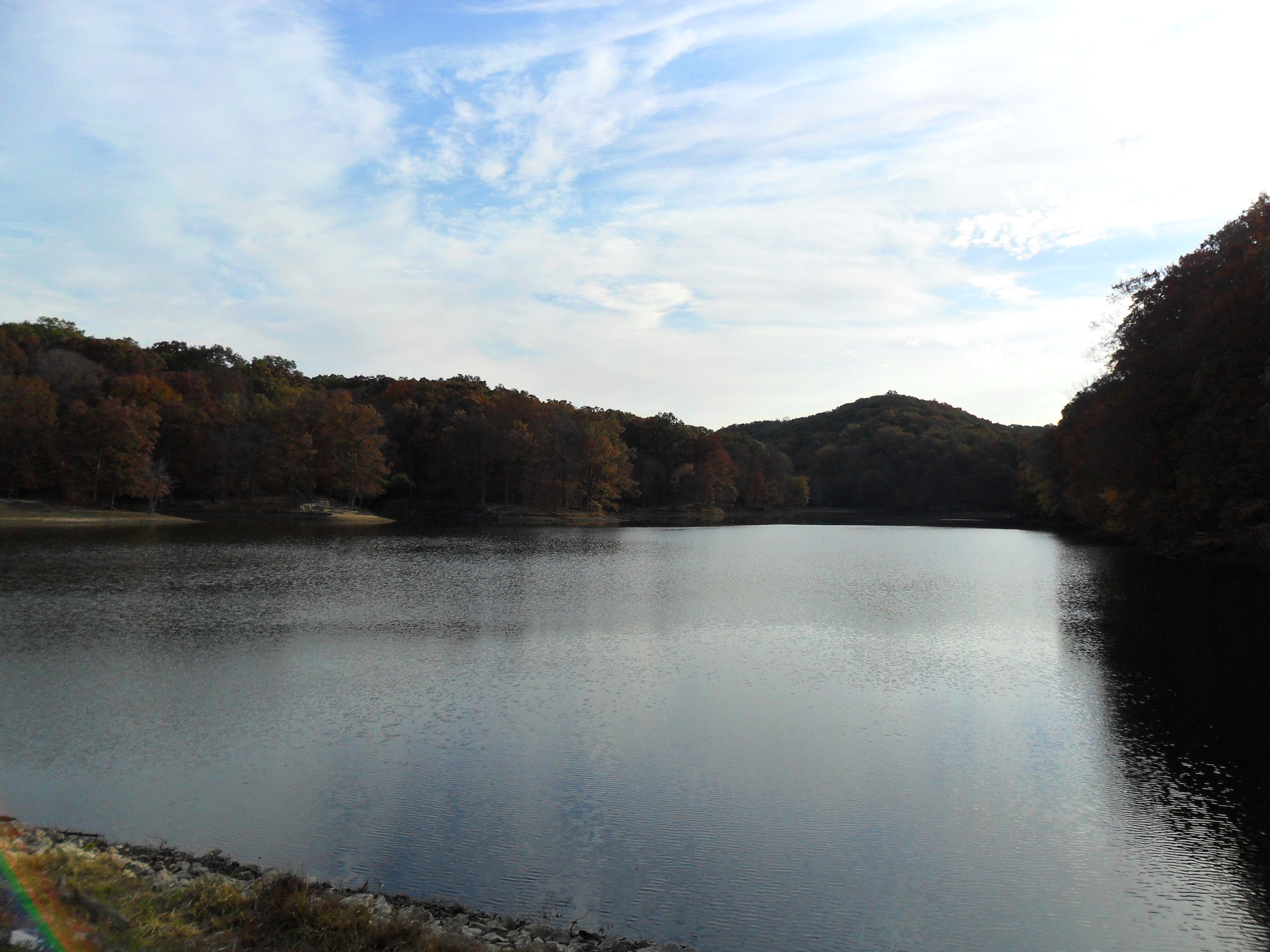 Strahl Lake